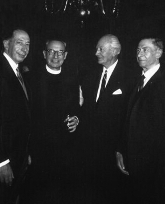 Edmond, Emmanuel, Henri, Xavier S.de Breuvery